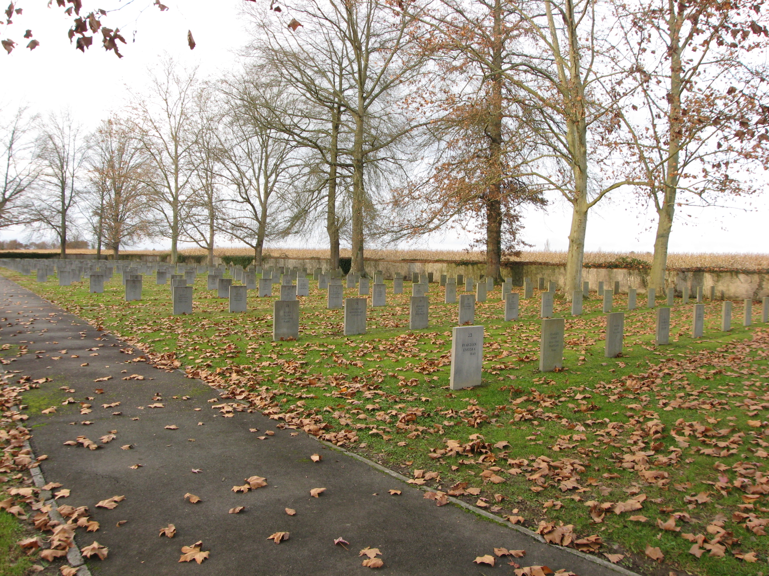 Vue partielle des tombes juives au camp de Gurs (Pyrénées-Atlantiques) (Pyrénées).